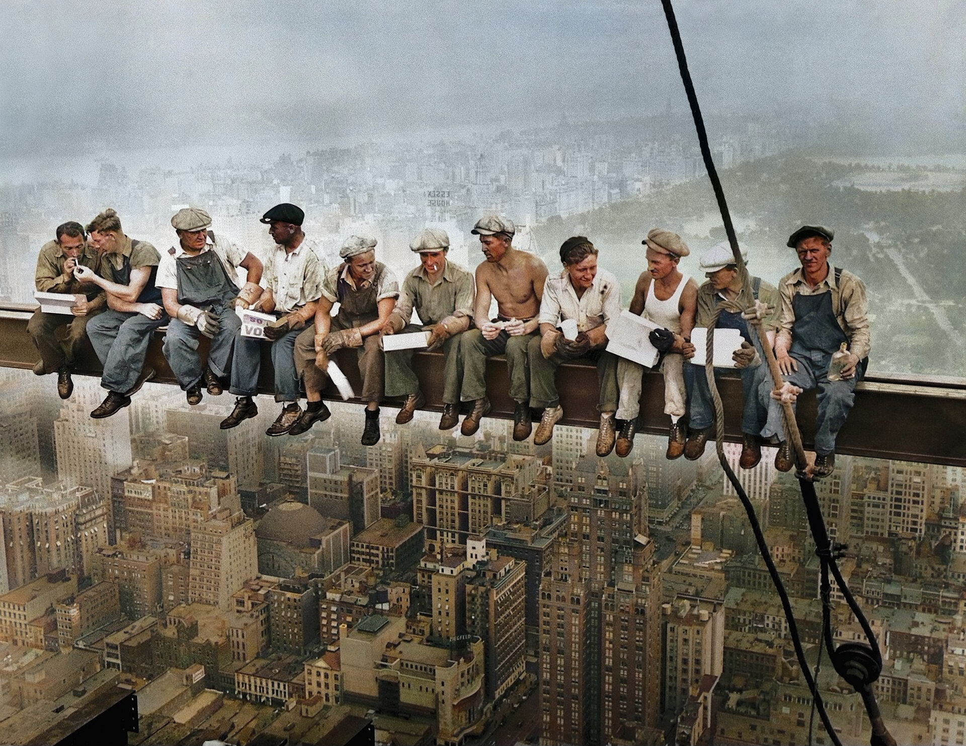 Opera derivata ottenuta tramite intelligenza artificiale. Foto ingrandita e ricolorata.